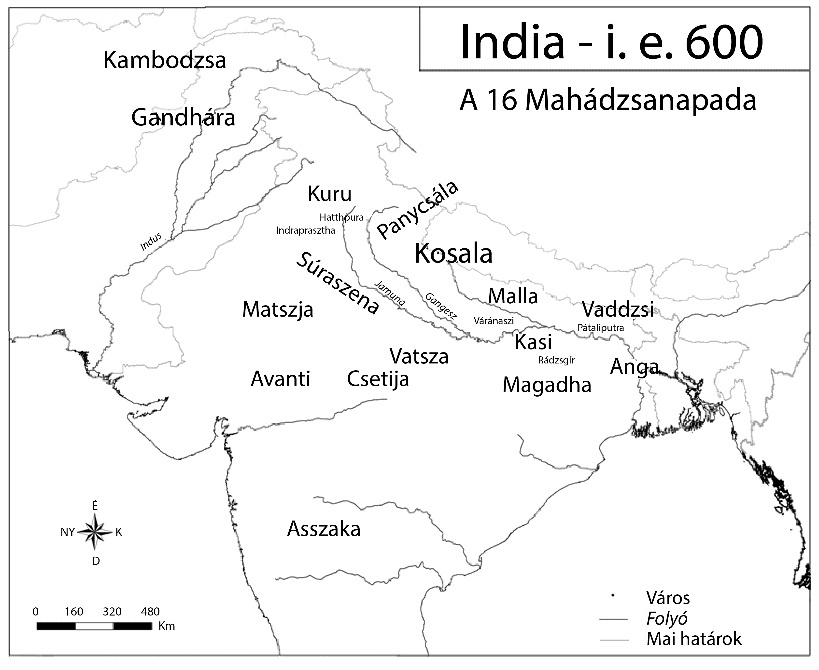 Ősi India - i. e. 600